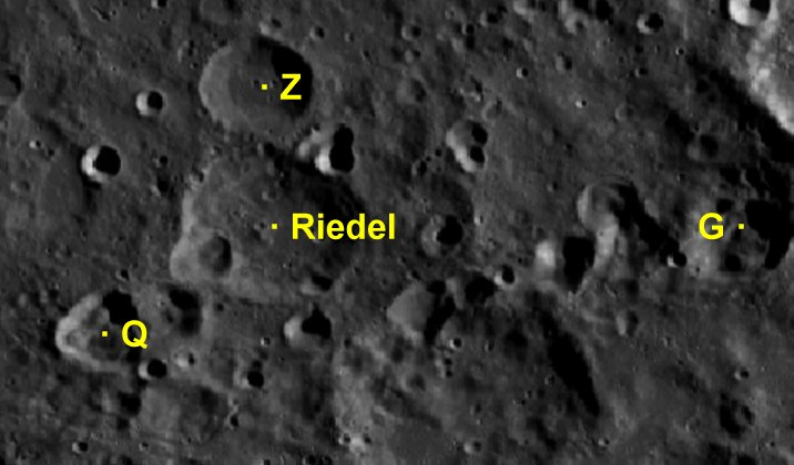 Cráter lunar Riedel. Cráteres satélite. (Imagen LRO)